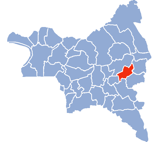 Auteur Hervé SUAUDEAU Licensing Catégorie:Cartes de Seine-saint-Denis Catégorie:Clichy-sous-Bois